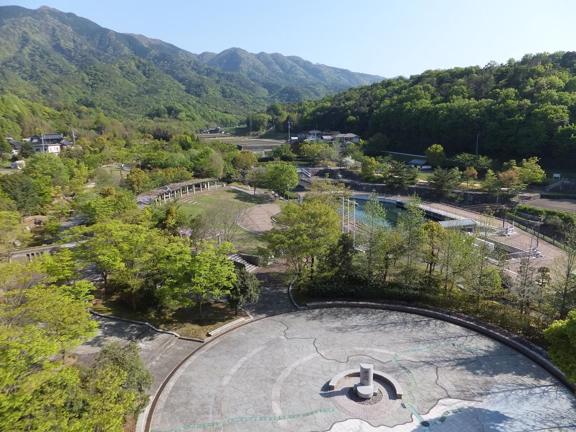 香川用水記念公園（三豊市）